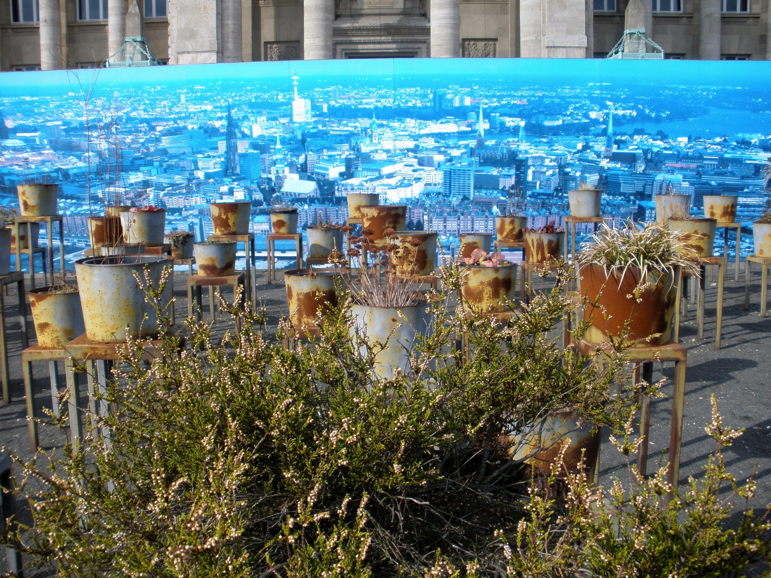 Le monument Hier + Jetzt de Gloria Friedman est à la mémoire des personnes condamnées à mort par la justice de Hambourg et des personnes exécutées pendant la période nazie dans la cour de la prison (Untersuchungsgefängnis am Holstenglacis).